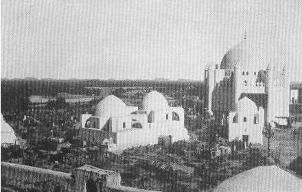 البقيع قديما قبل الهدم